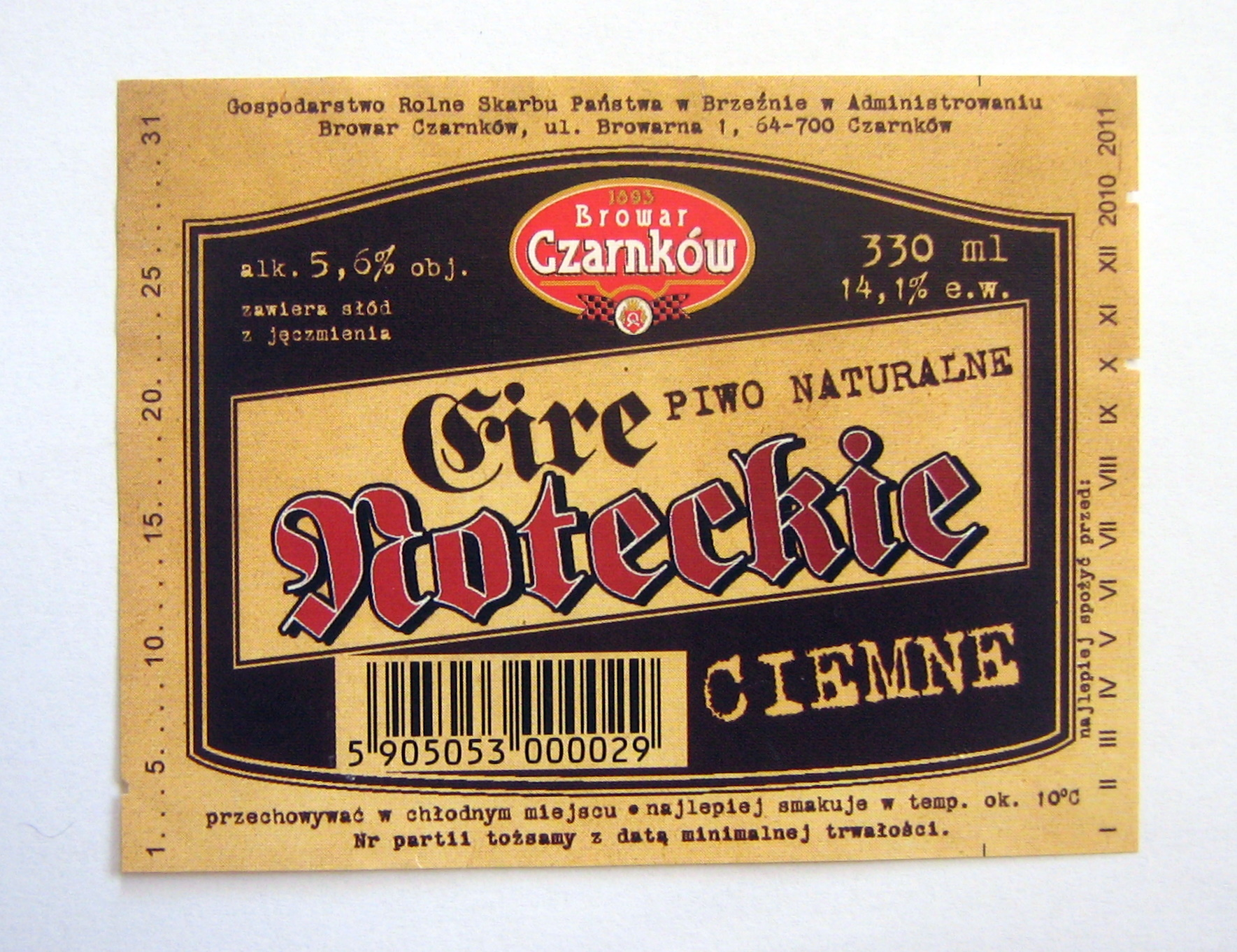 Etykieta z piwa Eire Noteckie, 2010 r.